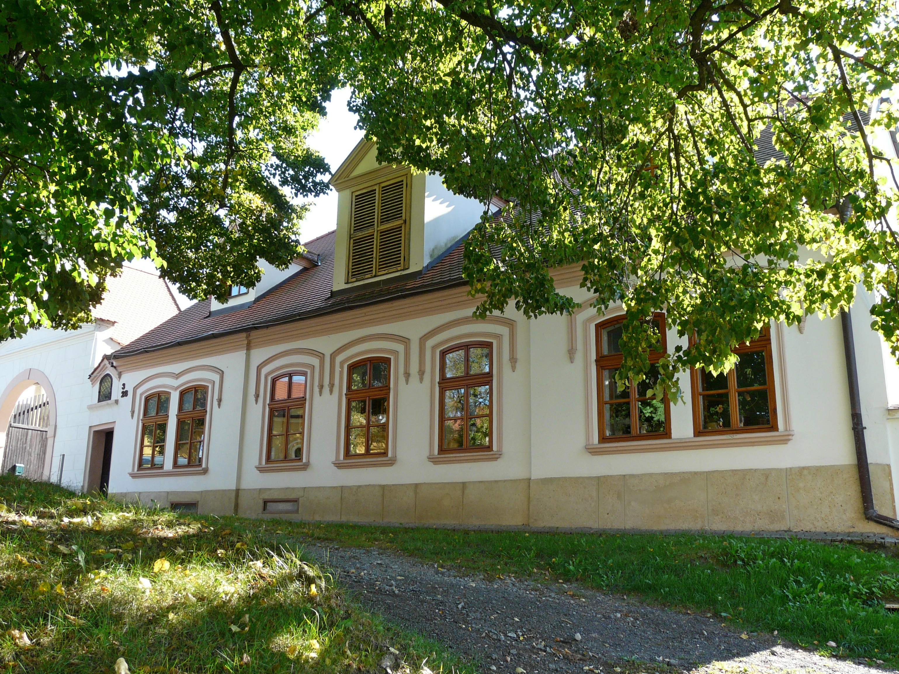 Venkovská usedlost (Černice), Selská náves 28/3, Černice